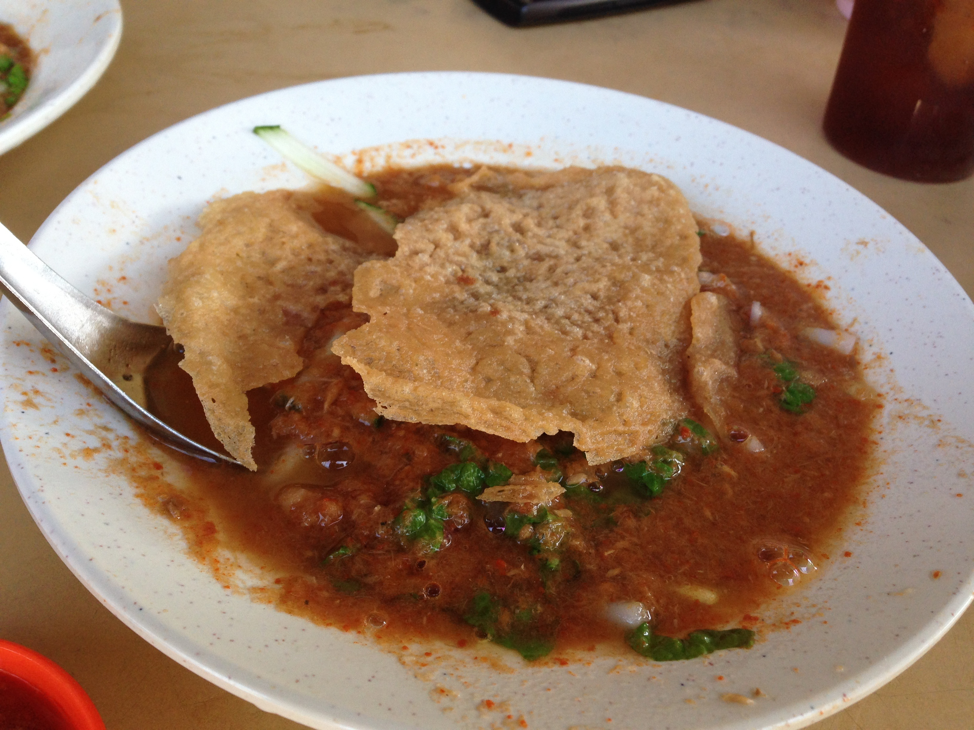 寒假 bangan samak and parit buntar